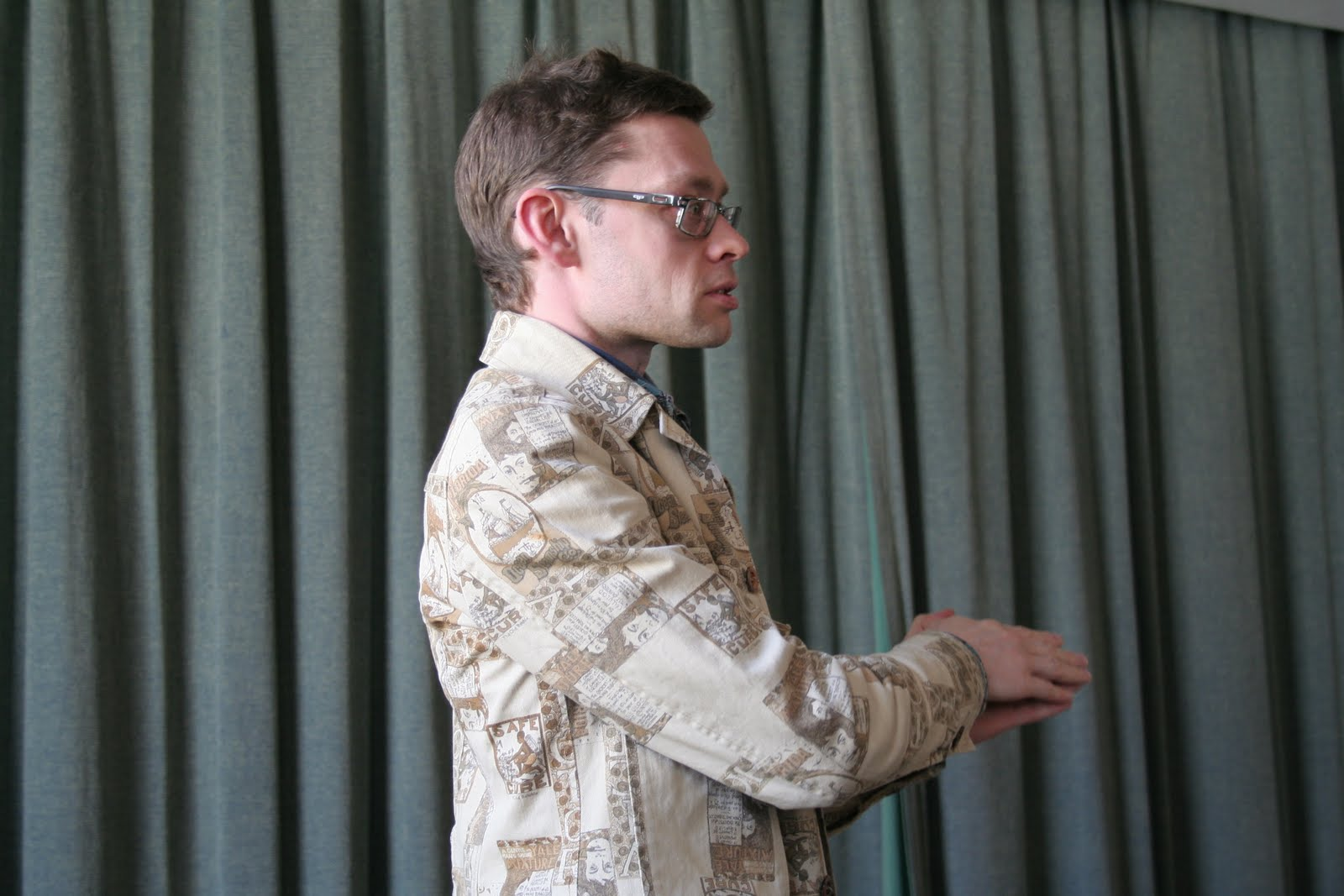 Berk Vaher Eesti Kirjanike Liidu üldkogul 2011. aastal.